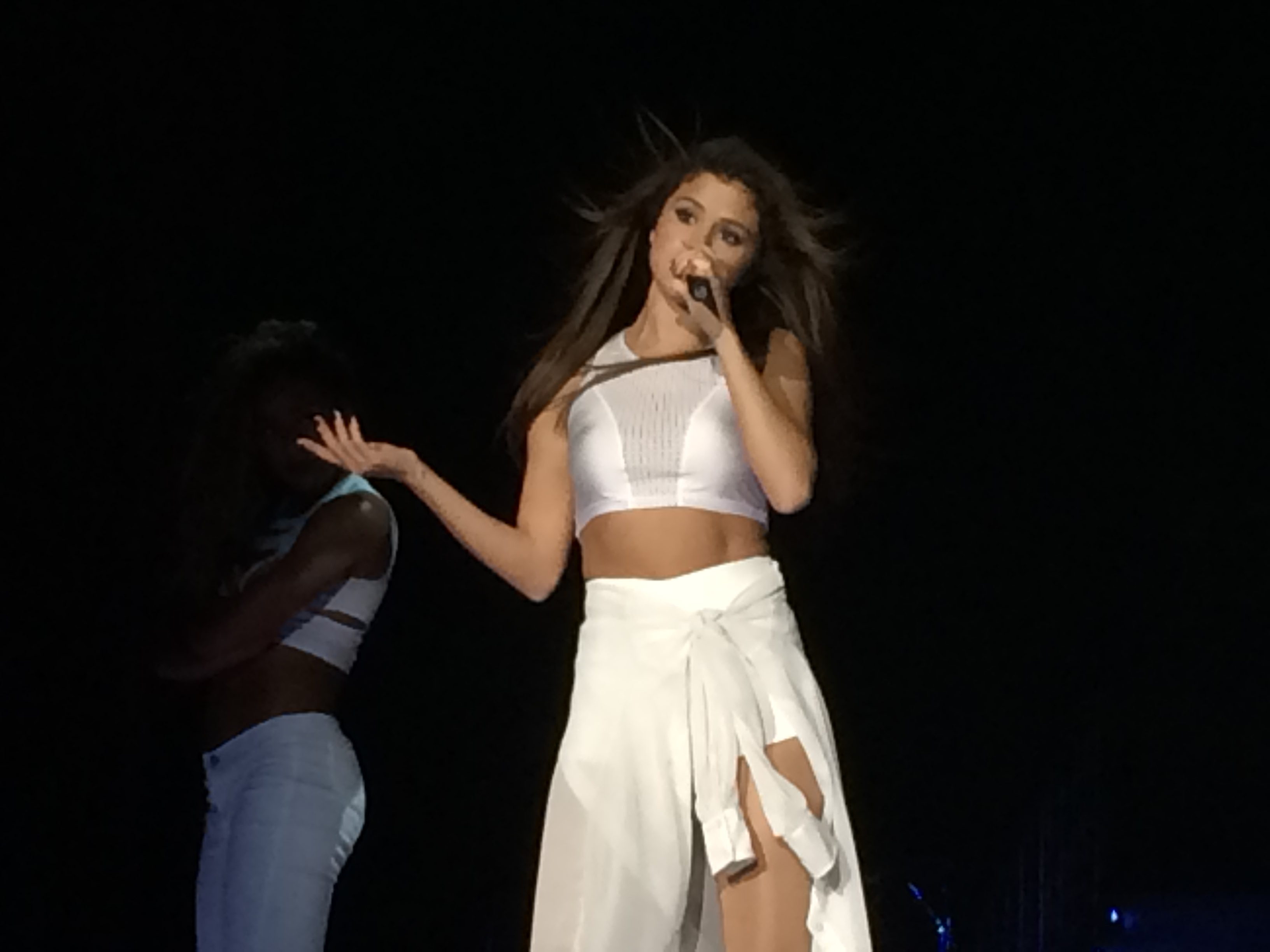 Selena Gomez StarsDance Nov 2013 San Diego, CA